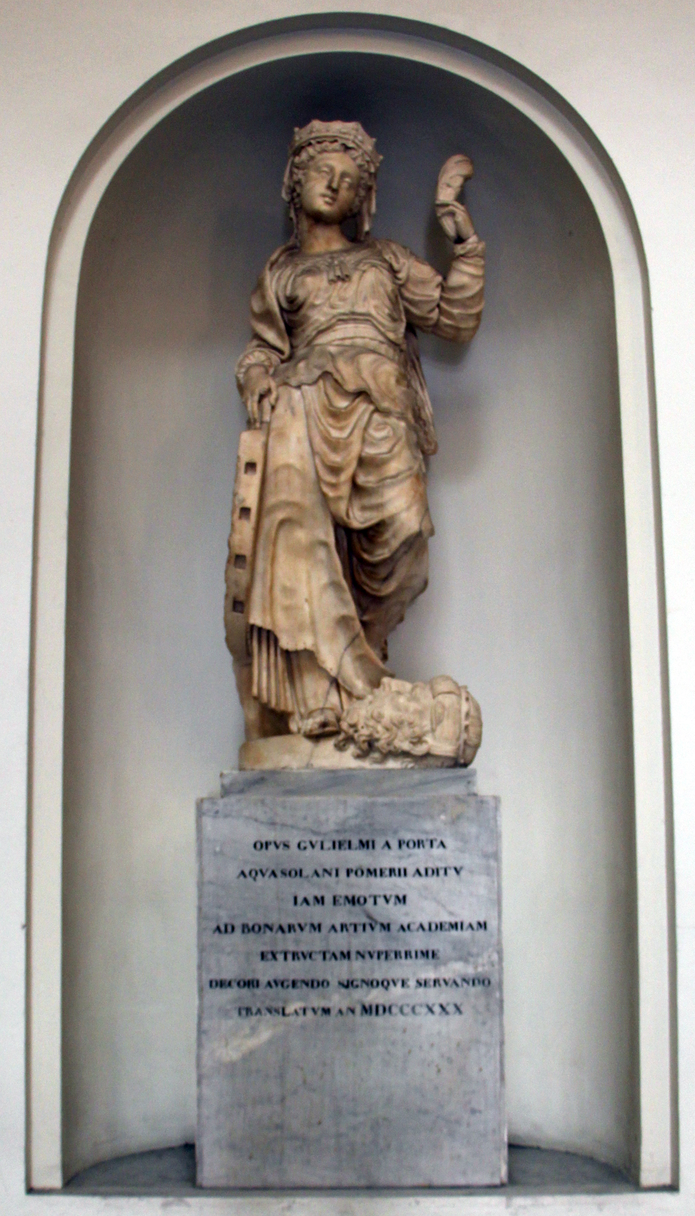 Accademia Ligustica di Belle Arti The making of this document was supported by Wikimedia CH. (Submit your project!) For all the files concerned, please see the category Supported by Wikimedia CH.